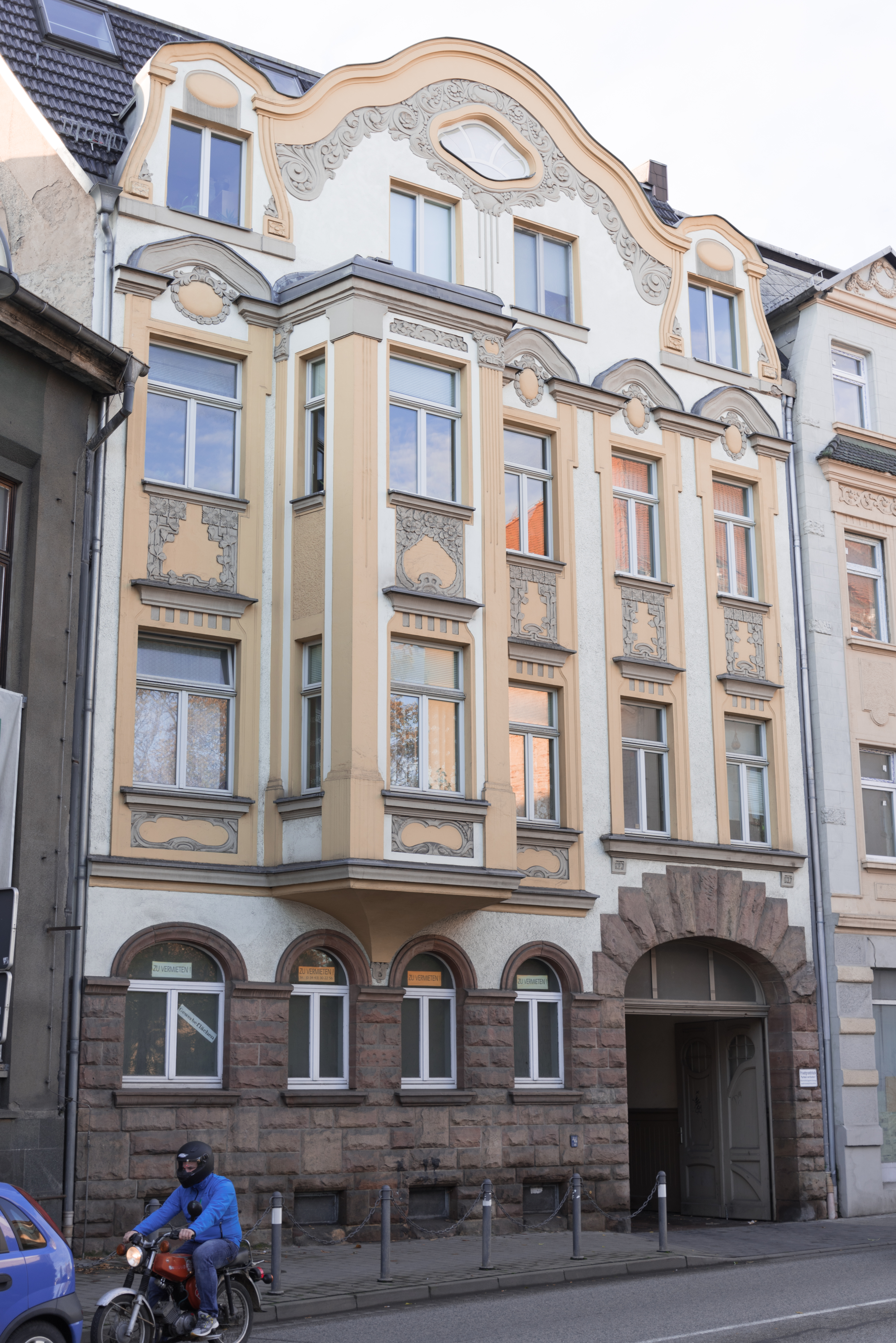 Weißenfels, Friedrichstraße 5